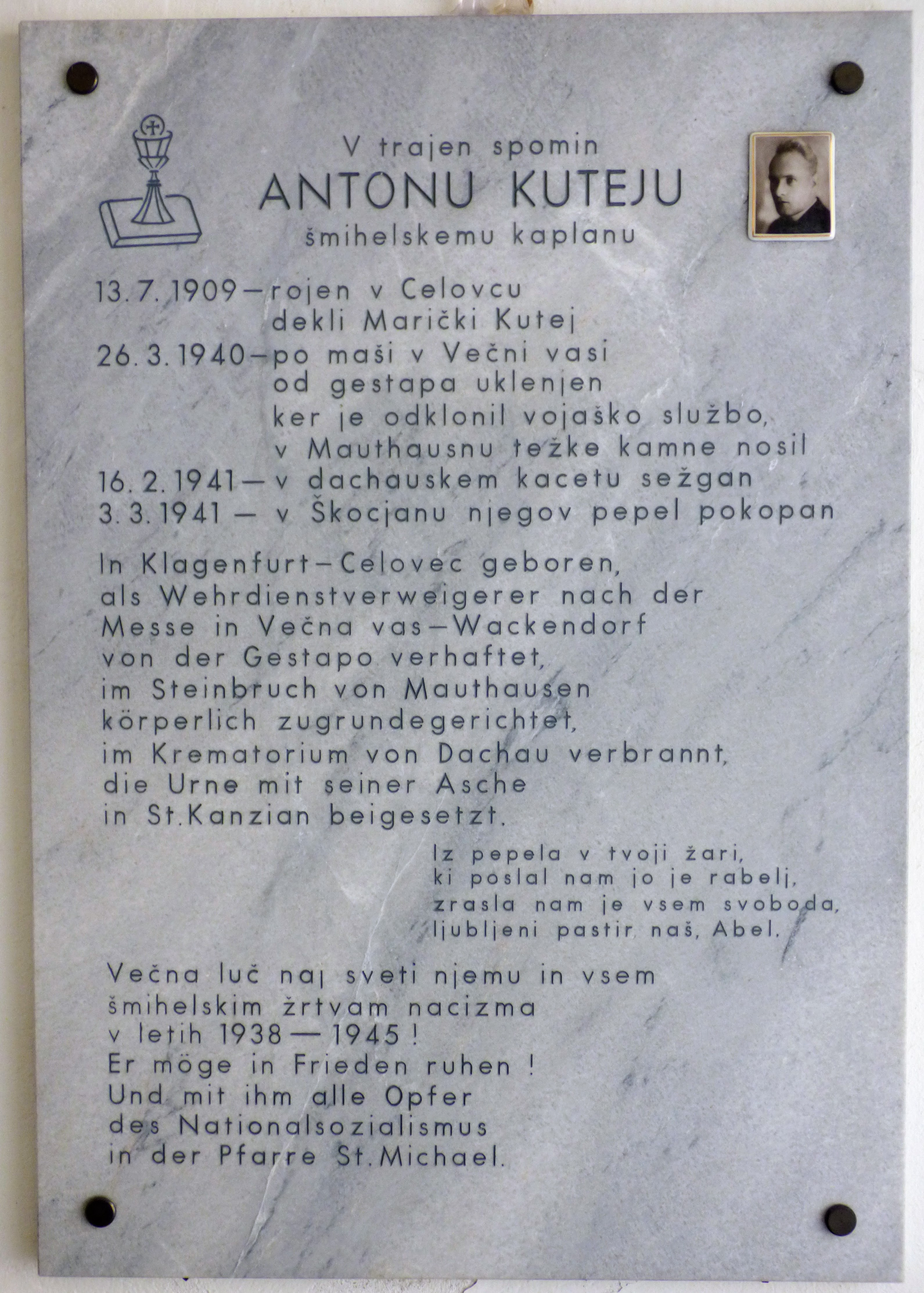 Kirche St. Michael bei Bleiburg Gedenktafel für den Priester und Wehrdienstverweigerer Anton Kutej